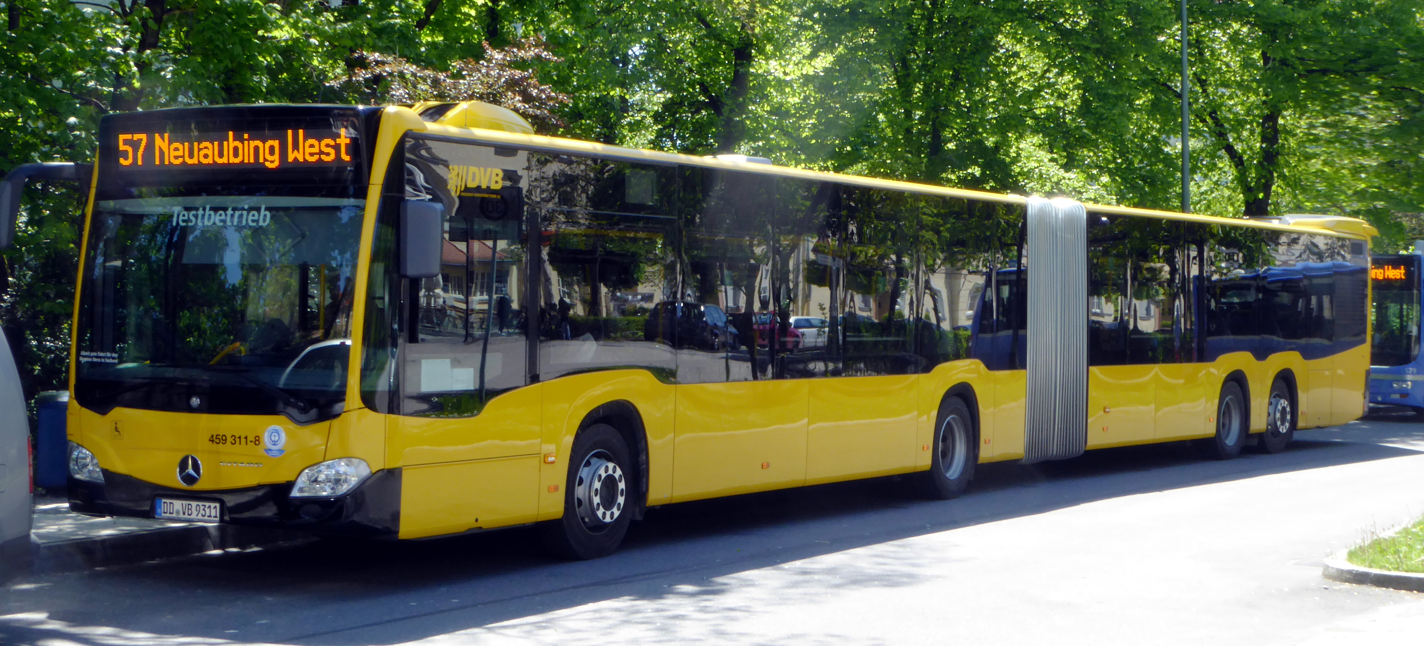 München, Mercedes-Vierachser-Bus der DVB im Testbetrieb auf der Linie 57.